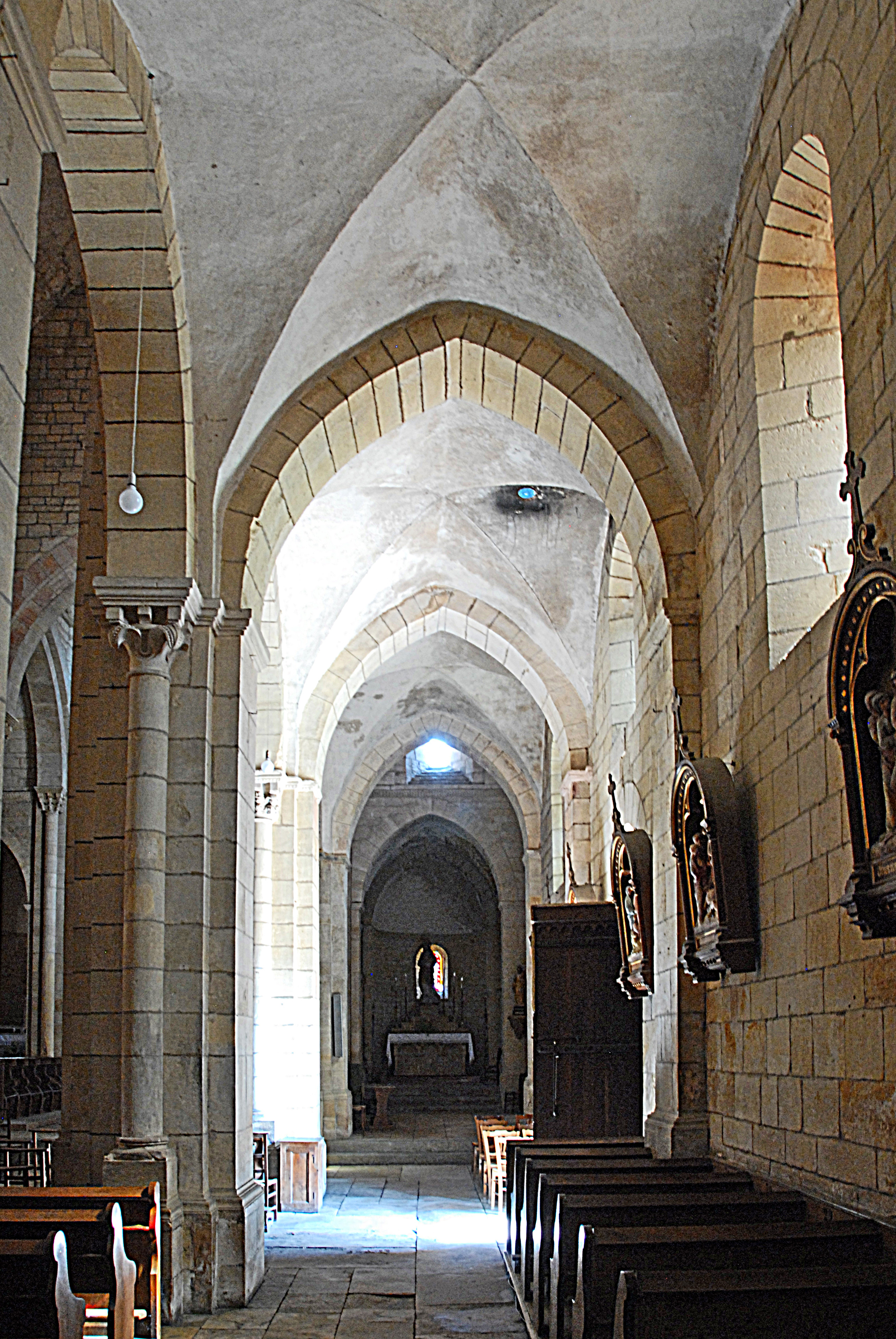 St-Hilaire de Semur-en-Brionnais, südl. Seitenschiff z. Chor